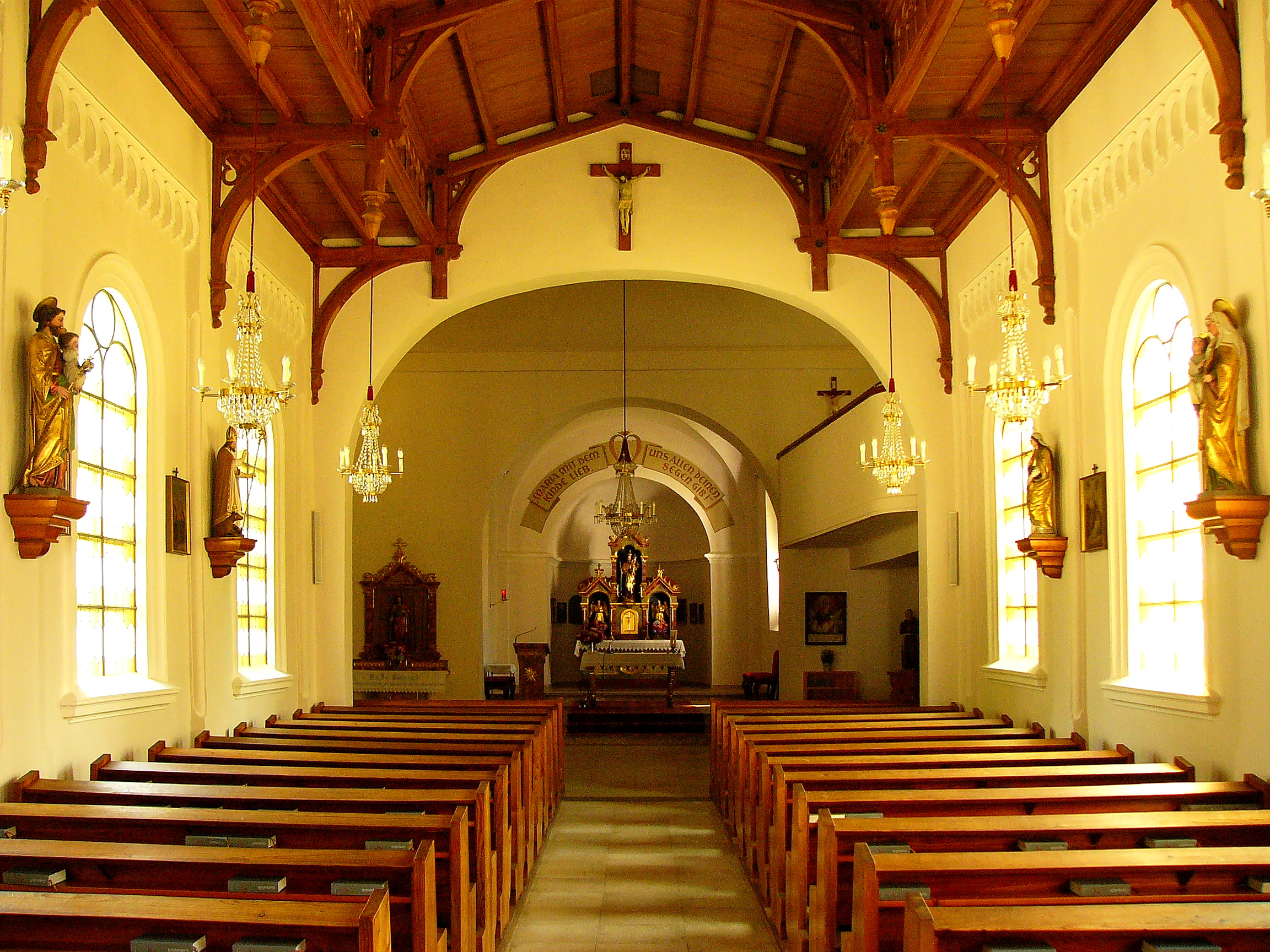 Das Schiff der Kirche Maria Fieberbründl.